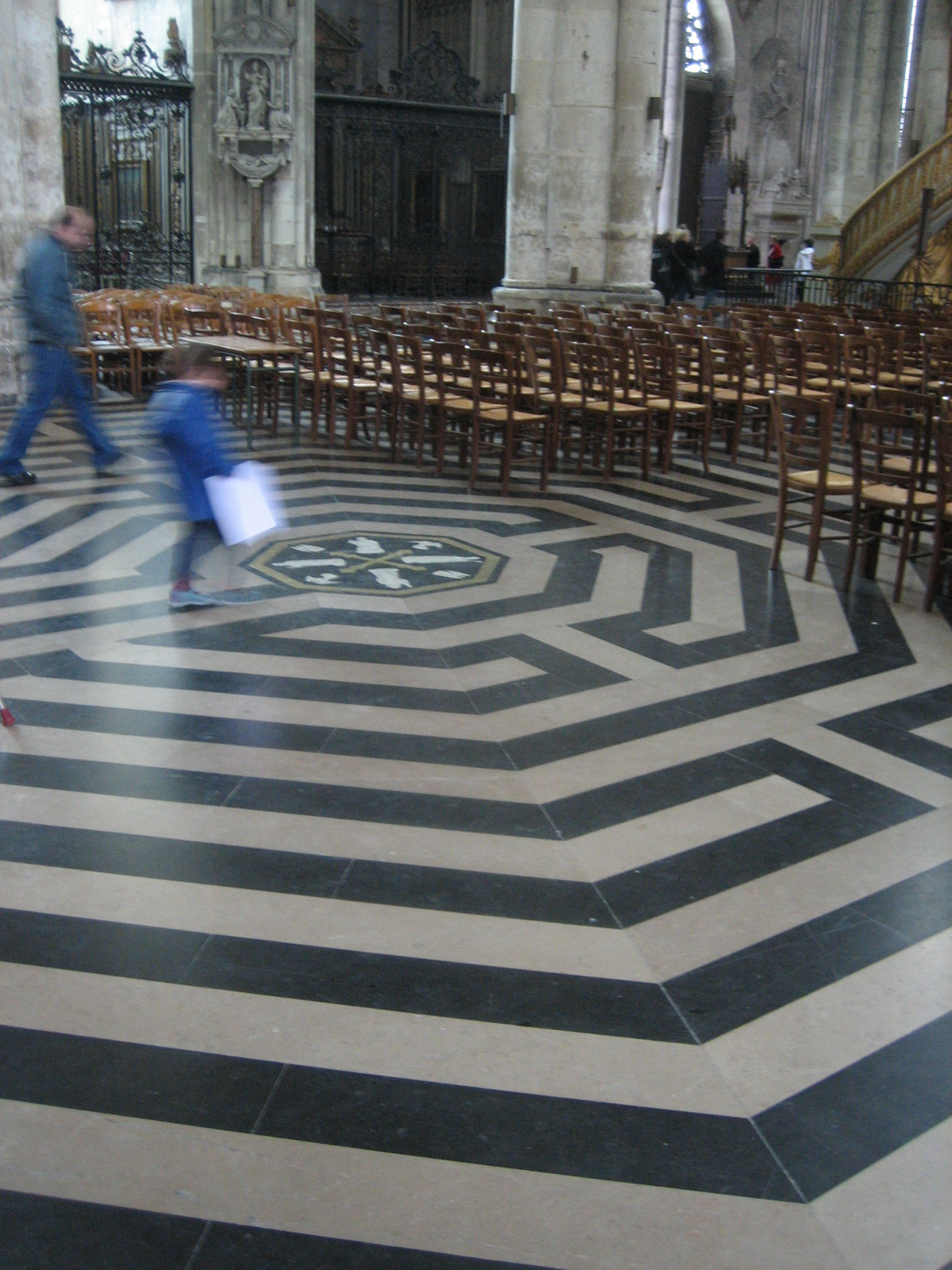 E Labyrinth um Buedem vun der Kathedral Notre-Dame vun Amiens.